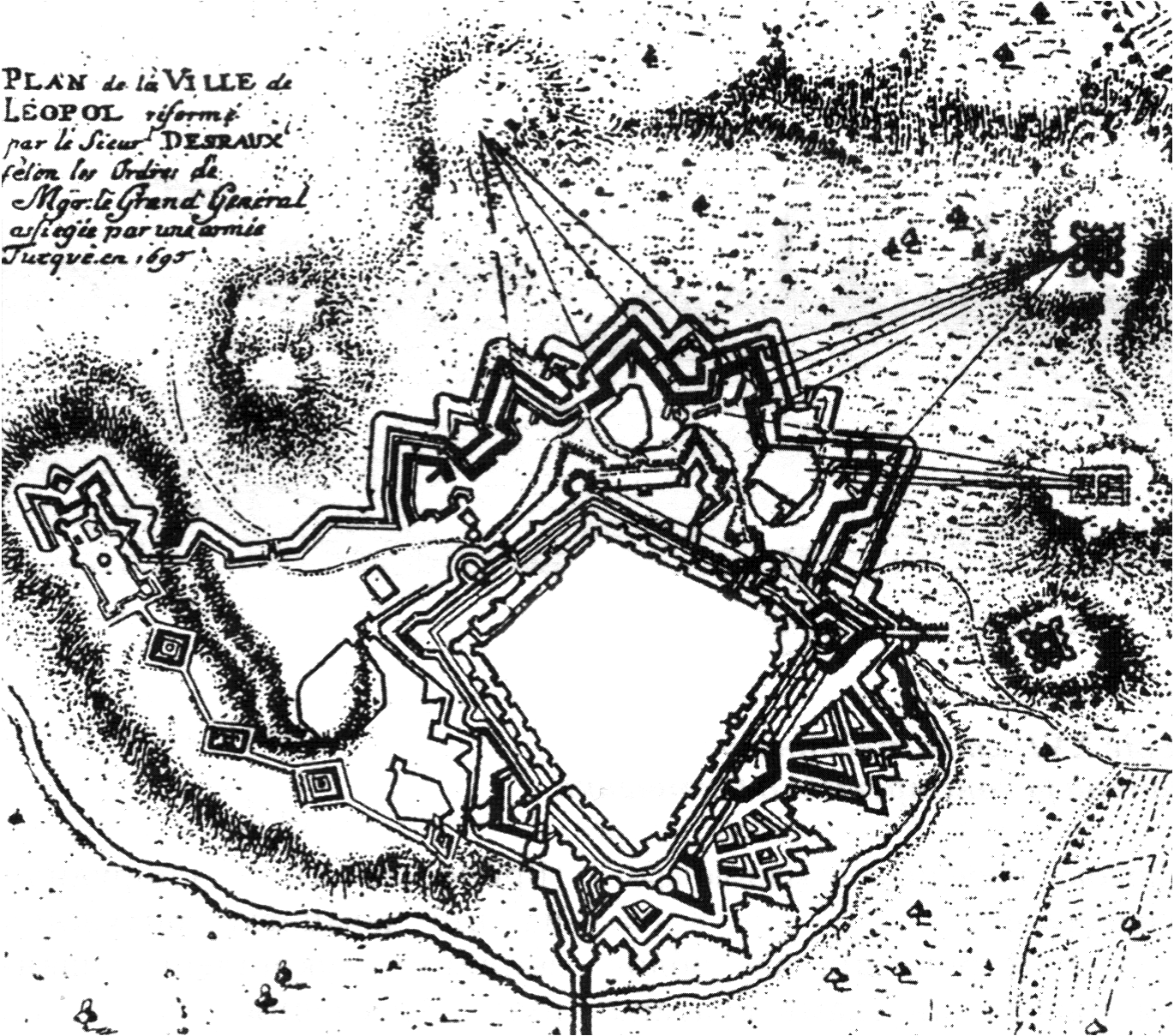 План фортифікацій Деро